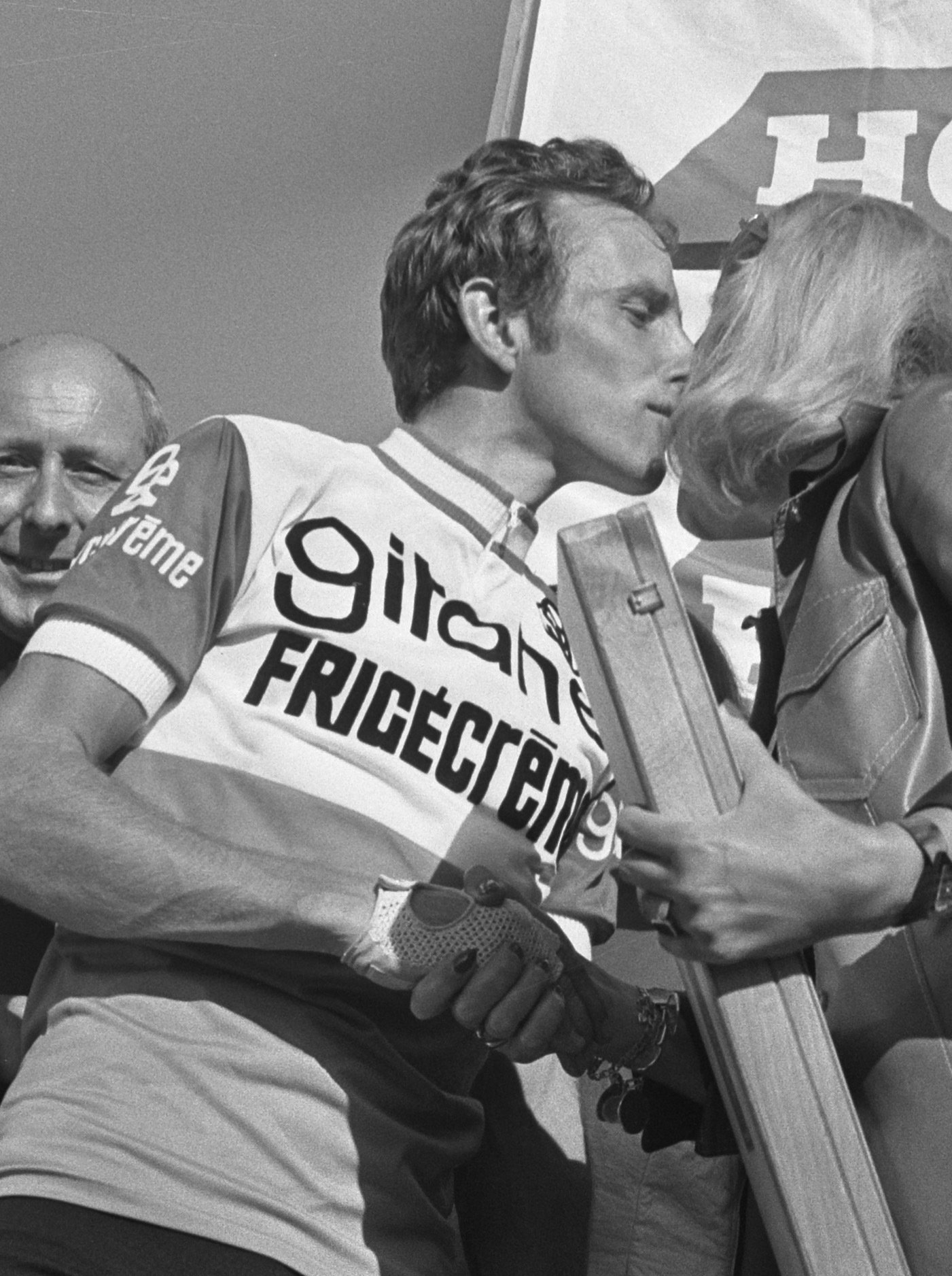 Proloog van Tour de France in Scheveningen, tijdrit, Joop Zoetemelk in gele trui.